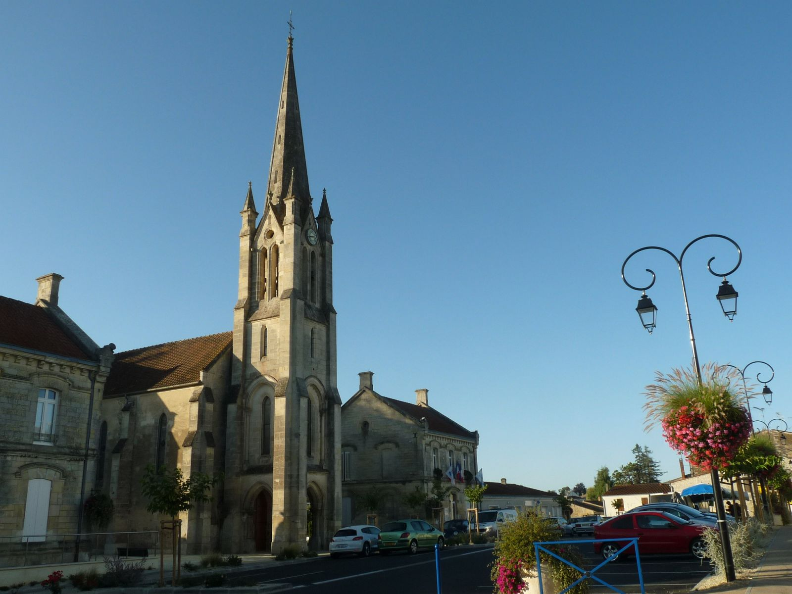 place de St-Genis-de-Saintonge (17), France